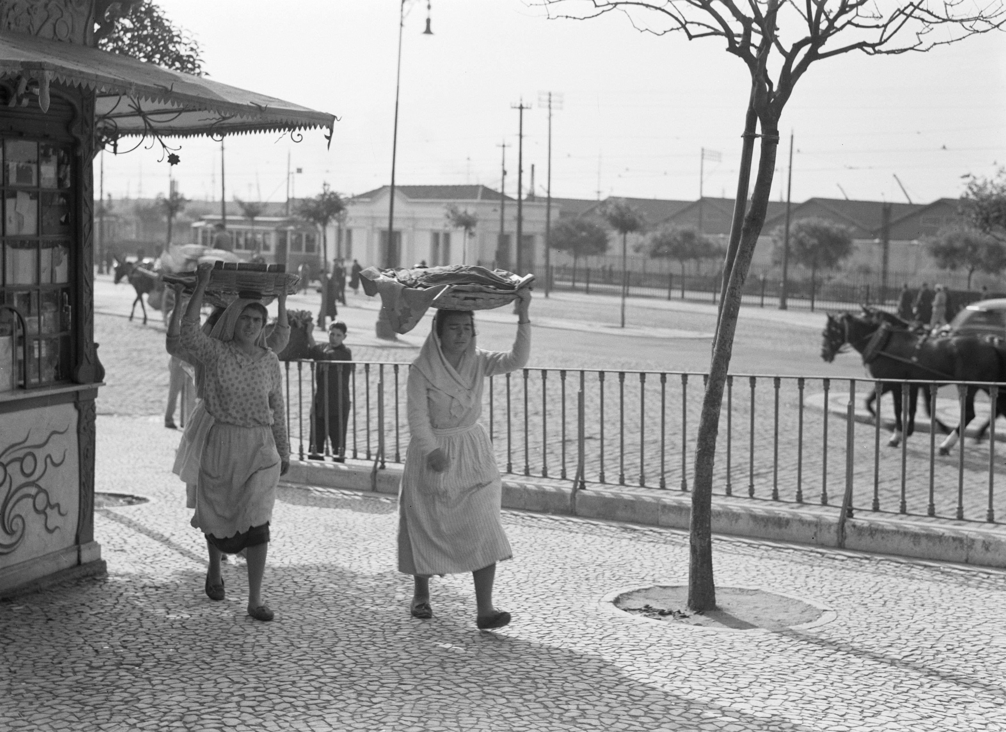 Collectie / Archief : Fotocollectie Van de Poll Reportage / Serie : Zeereis met MS Baloeran Beschrijving : Vrouwen met manden op hun hoofd naast een kiosk [omgeving Cais do Sodré of Santa Apolonia?) Annotatie : Deze foto maakt deel uit van een serie foto's van een reis met de MS Baloeran van de Rotterdamse Lloyd Datum : mei 1935 Locatie : Lissabon, Portugal Trefwoorden : straatbeelden, vrouwen Fotograaf : Poll, Willem van de Auteursrechthebbende : Nationaal Archief Materiaalsoort : Glasnegatief Nummer archiefinventaris : bekijk toegang 2.24.14.02 Bestanddeelnummer : 191-0205